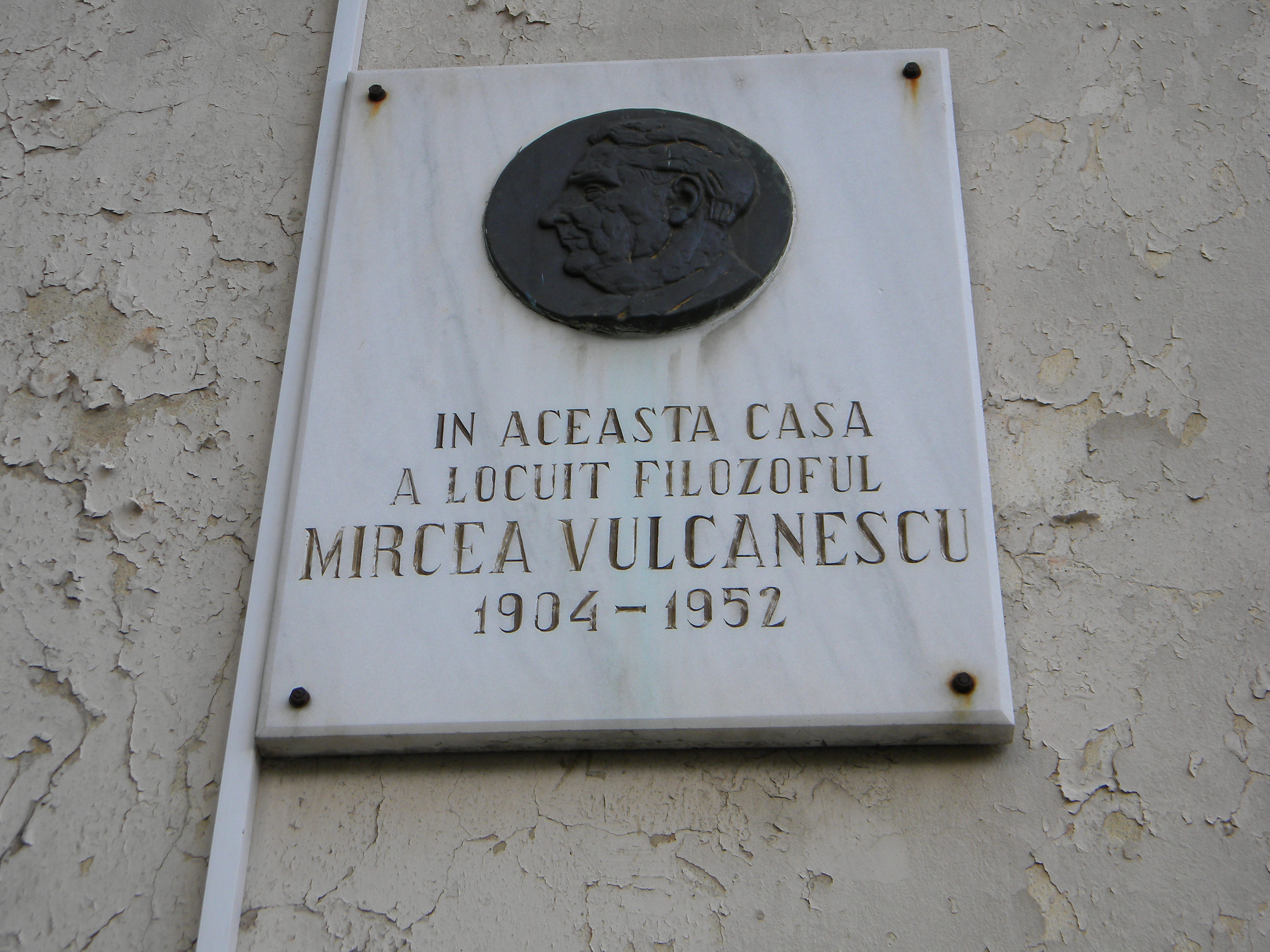 Bucuresti, Romania. Placa comemorativa pentru filozoful Mircea Vulcanescu. Str. Popa Soare nr. 16A